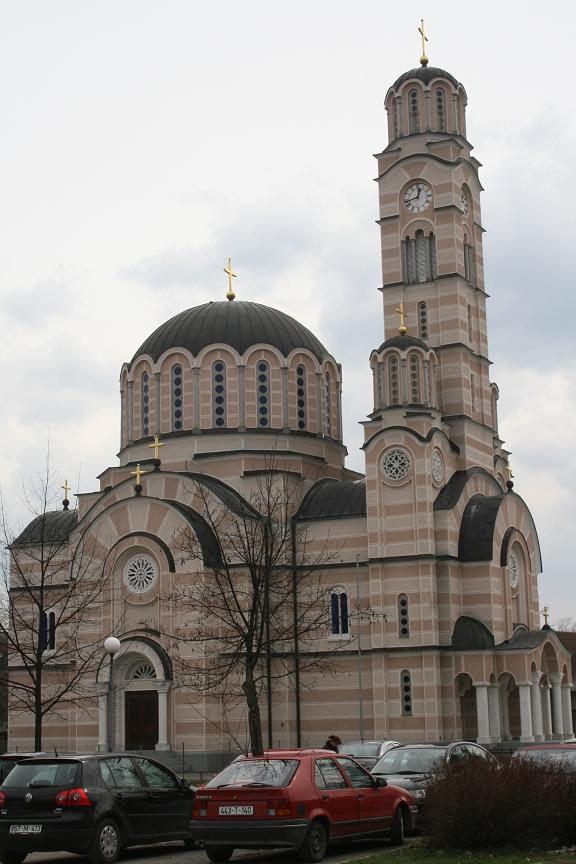 Orthodoxe Kirche im Stadtzentrum von Teslic